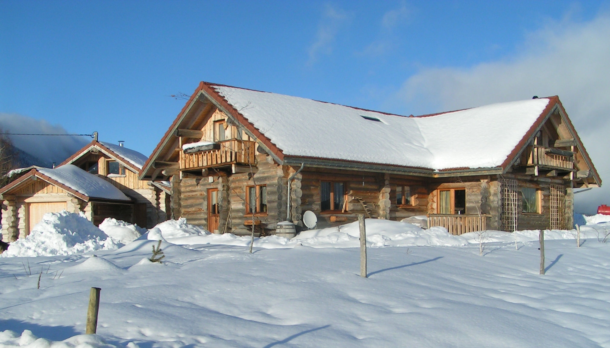 Photo personnelle de notre fuste construite en 2004